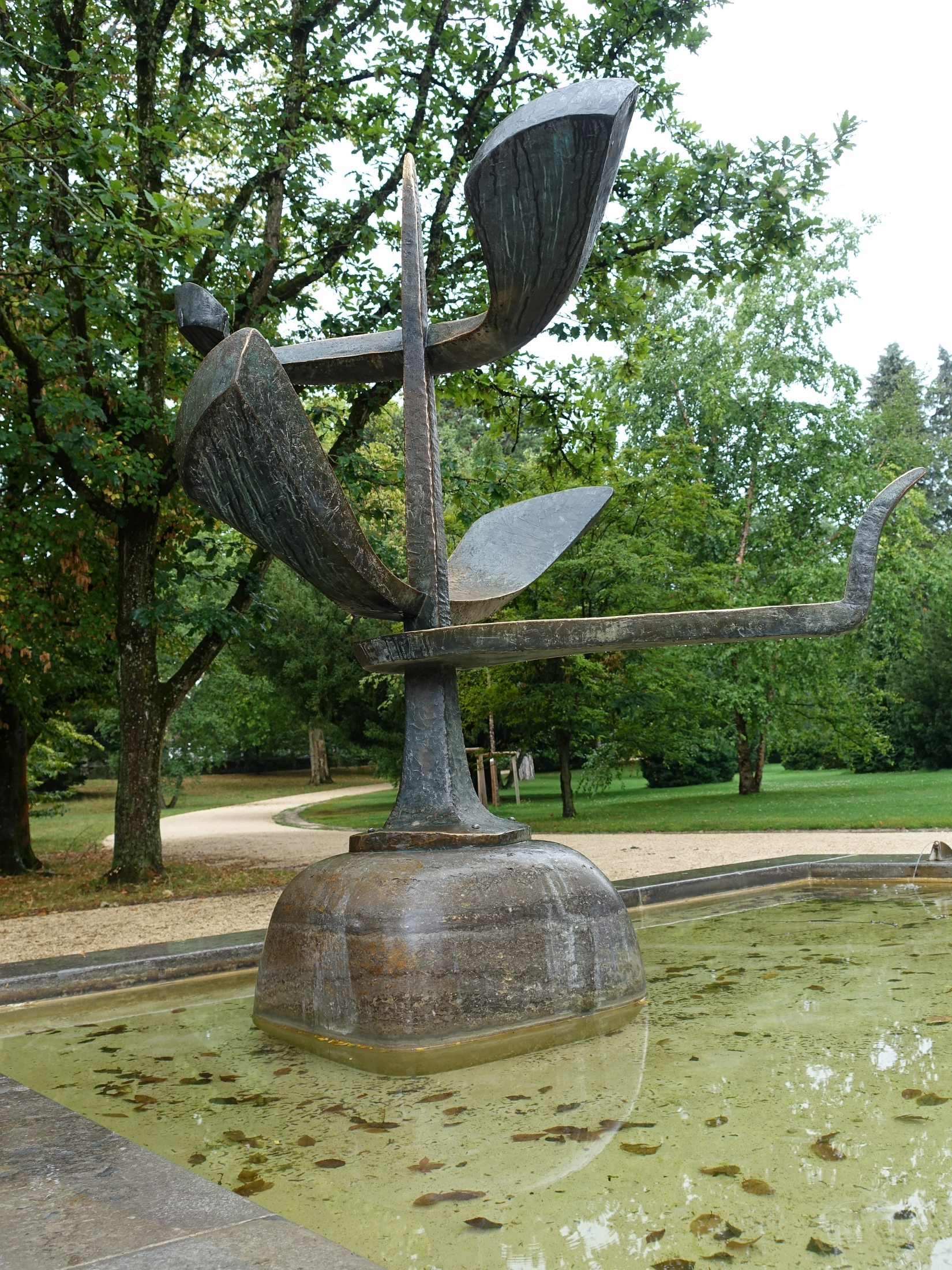 Brunnenplastik (1962) im Kannenfeldpark Basel von Vera Scholz von Reitzenstein (1924–2018), im Auftrag des Kunstkredit-Basel-Stadt.